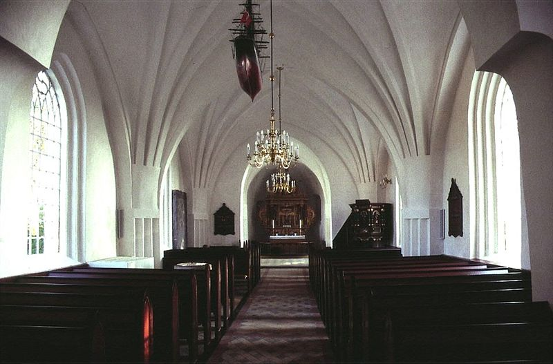 Tillitse Kirke i Danmark. Skibet set mod øst